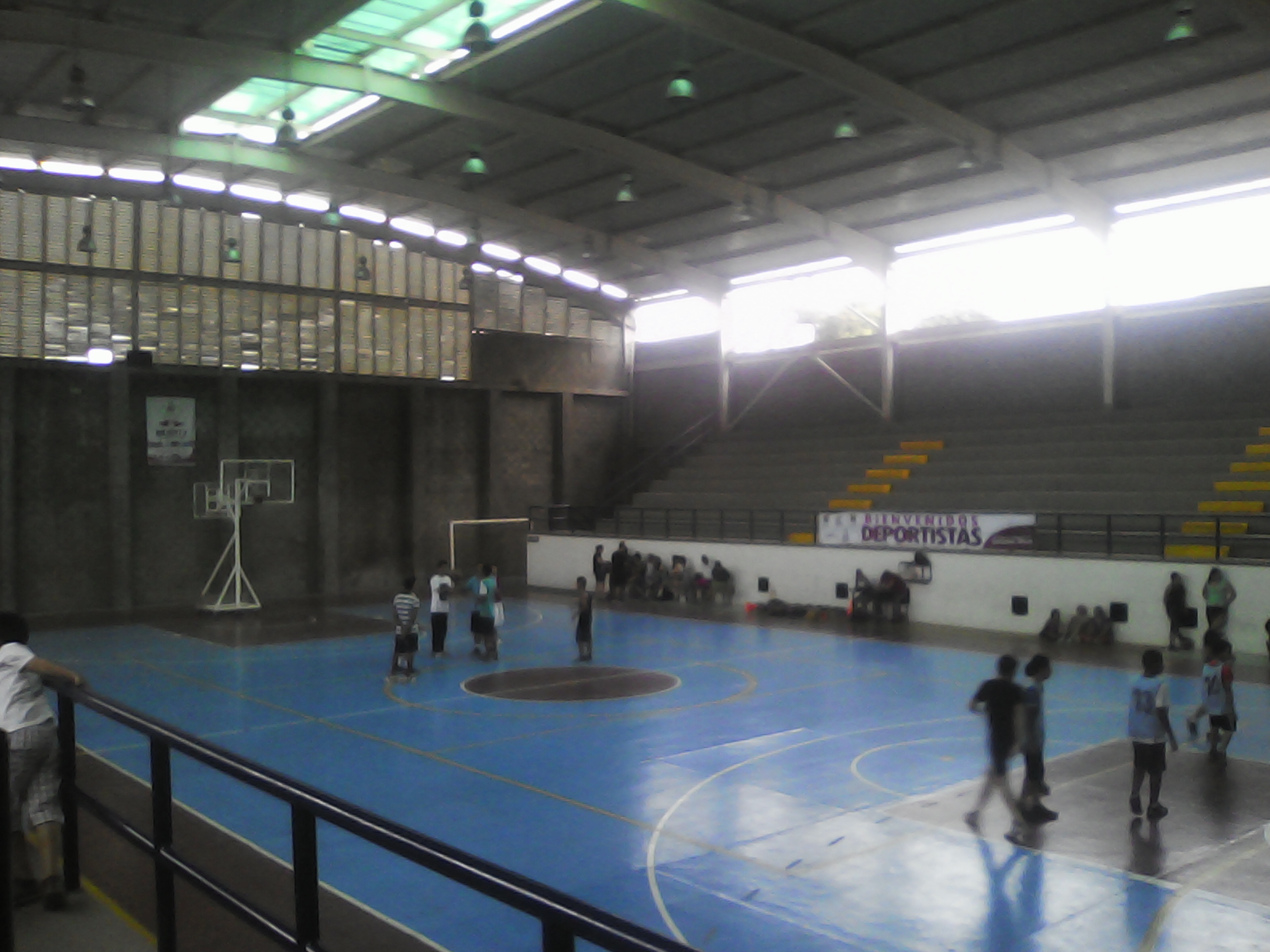 Canchas de Fútbol Sala y Baloncesto